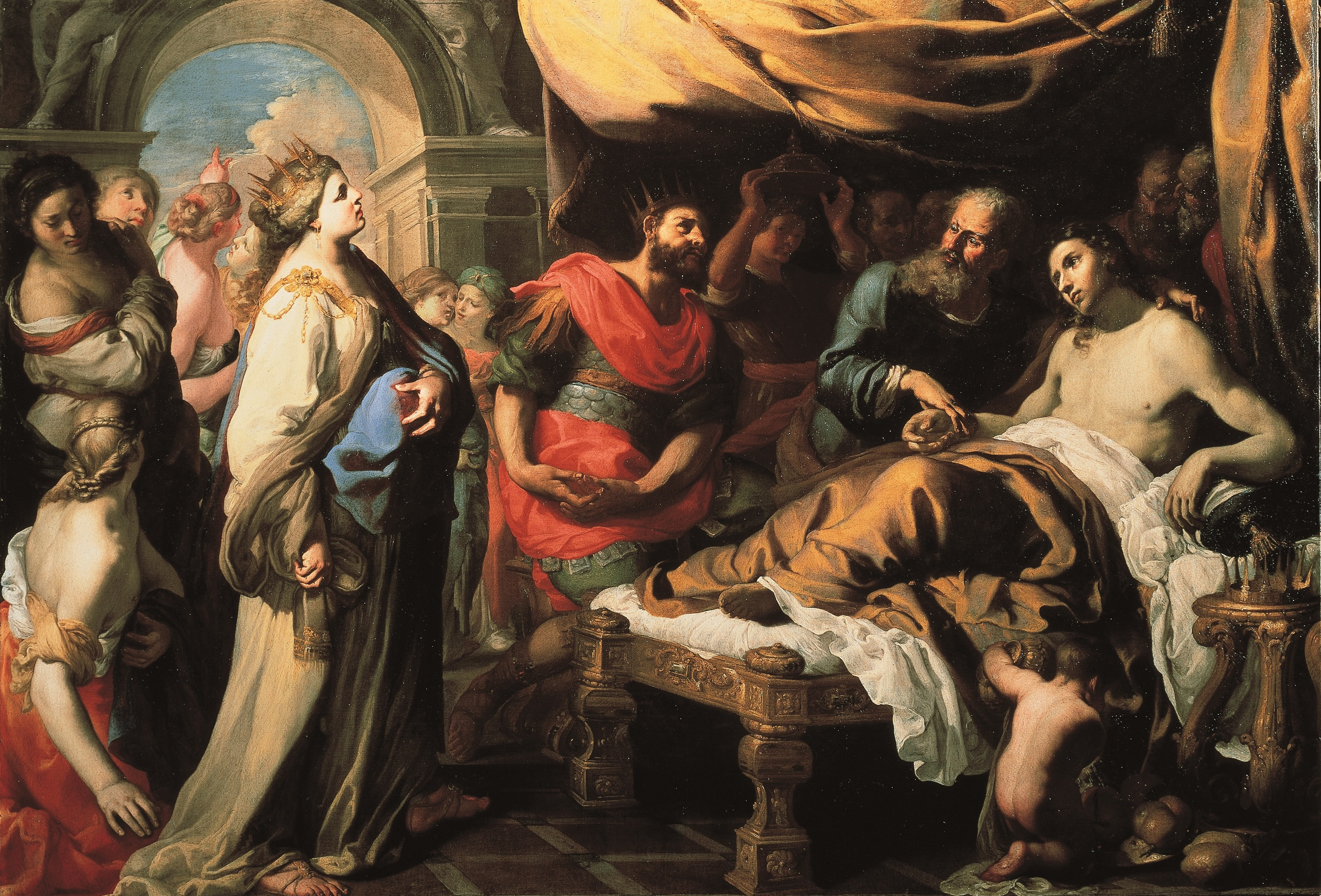 Antiochius et Stratonyce. Coll. Monte dei Paschi (Siena)